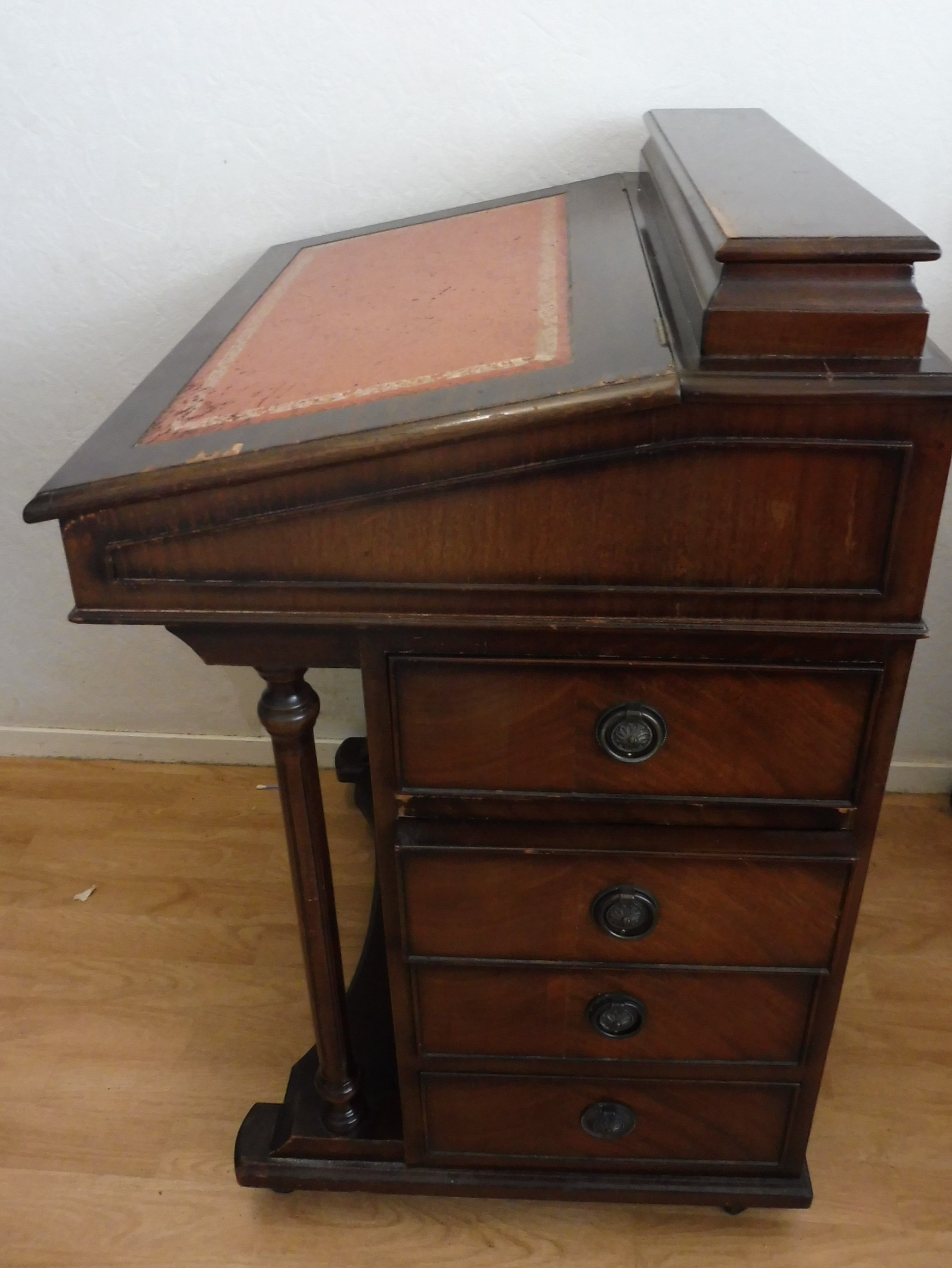 Vue de profil d'une copie d'un secrétaire Davenport plaqué en acajou et réalisé au XXe siècle